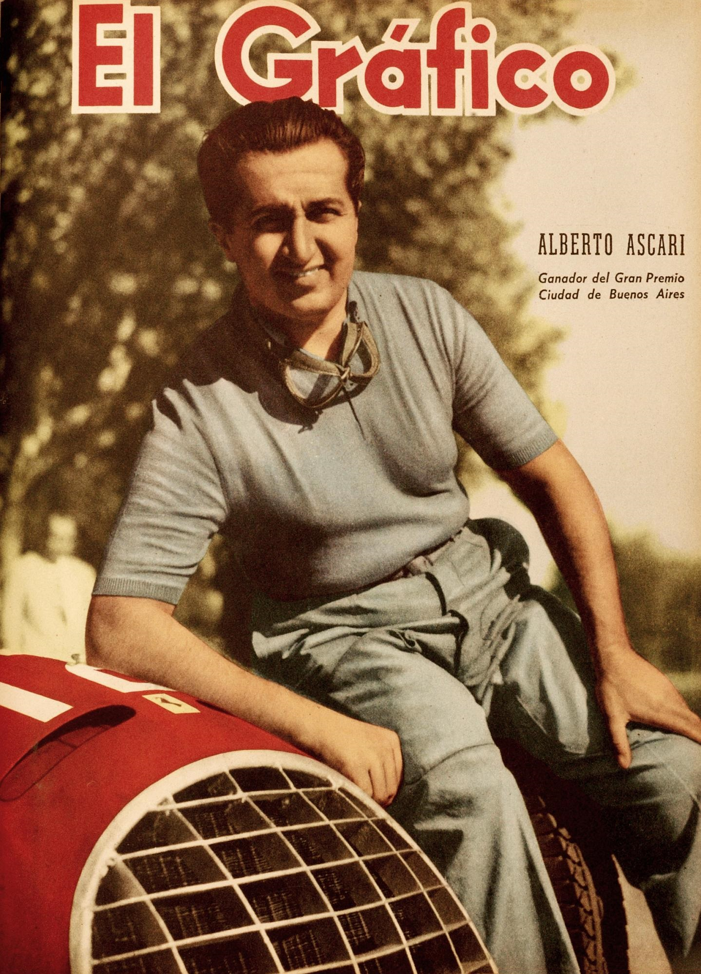 El Grafico del 06 de Enero de 1950. Edicion 1587